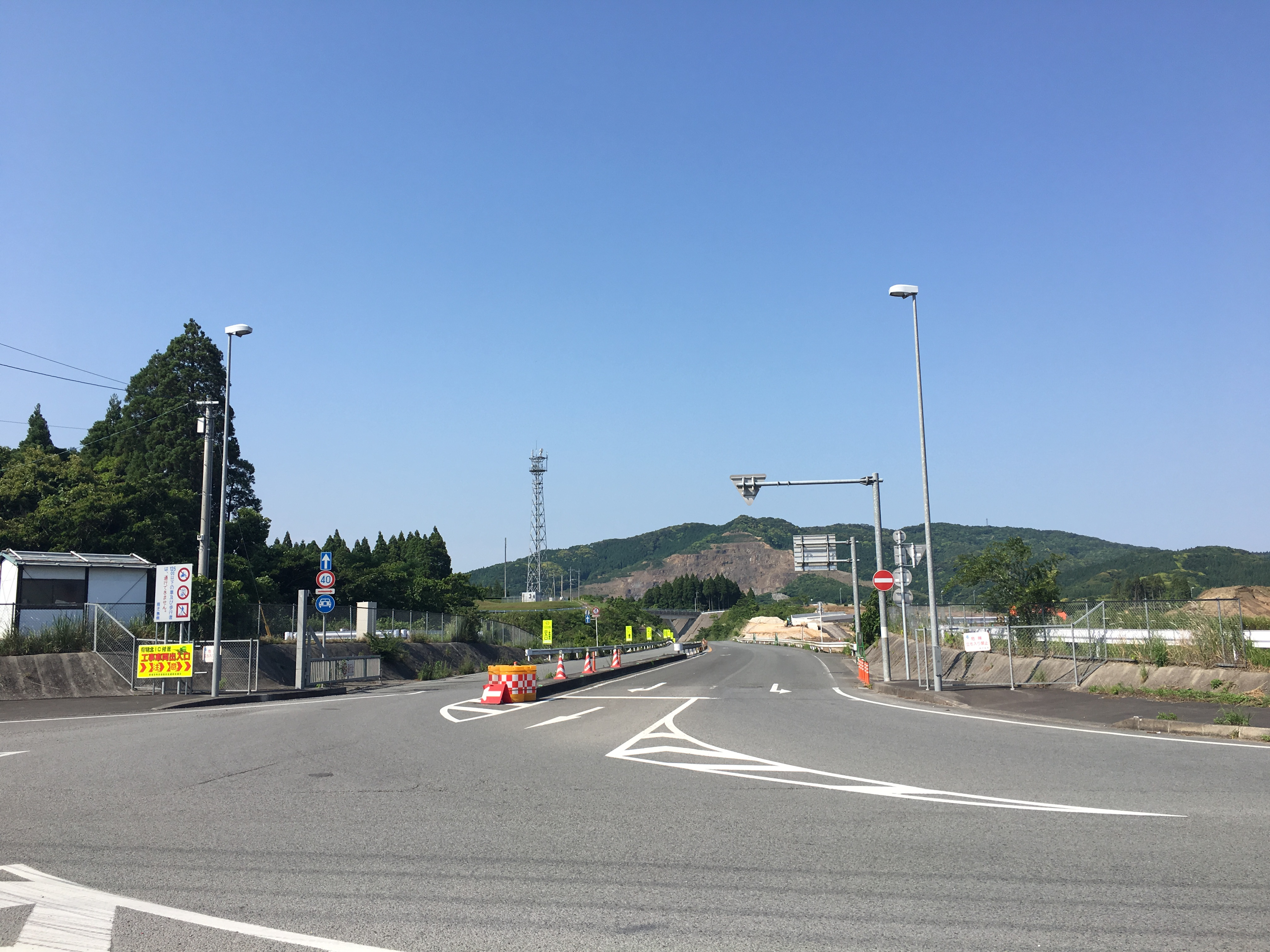 有明北インターチェンジの出入口。